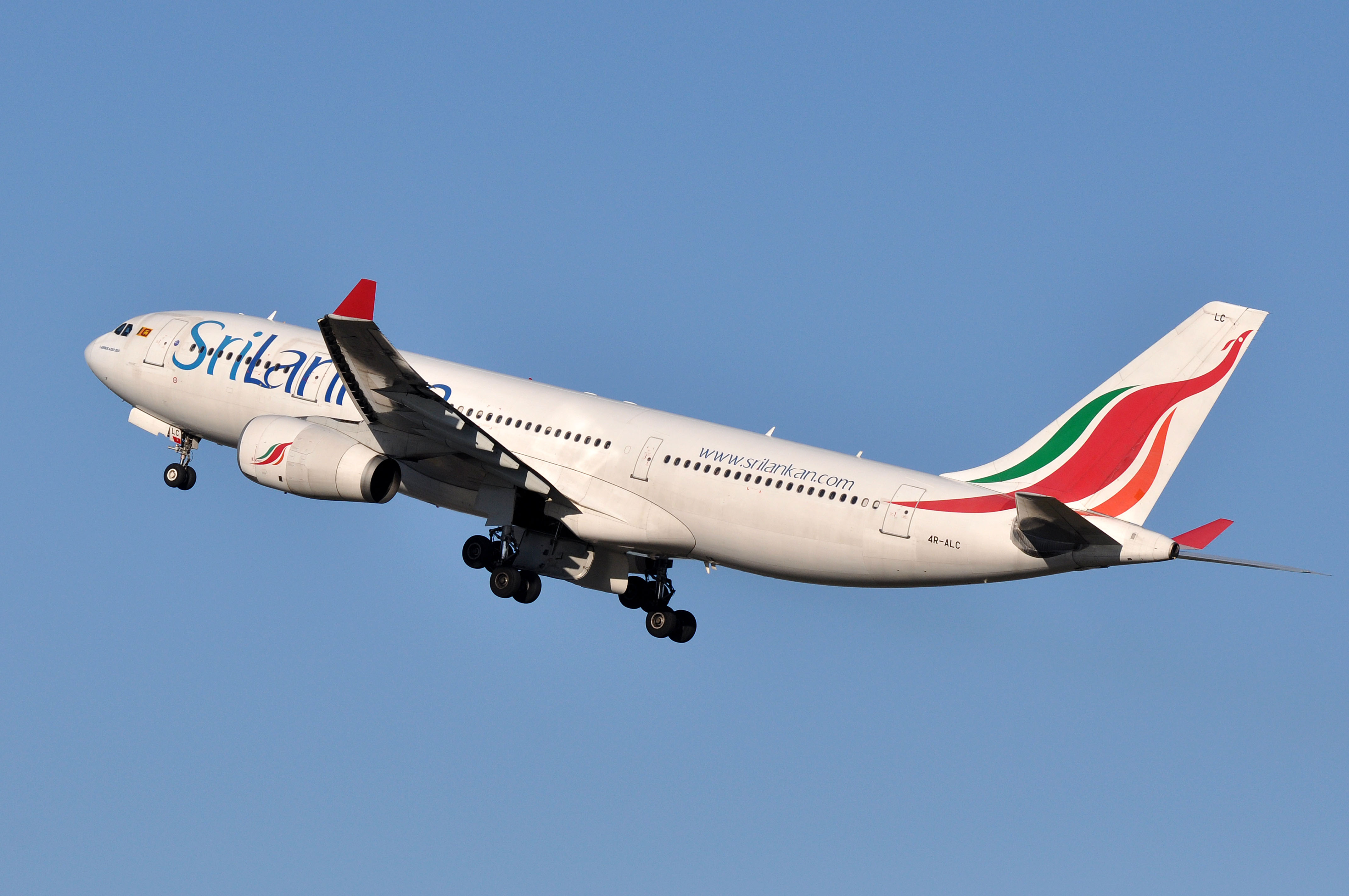 MSN 311 A330-243 SRILANKAN AIRLINES FCO AIRPORT